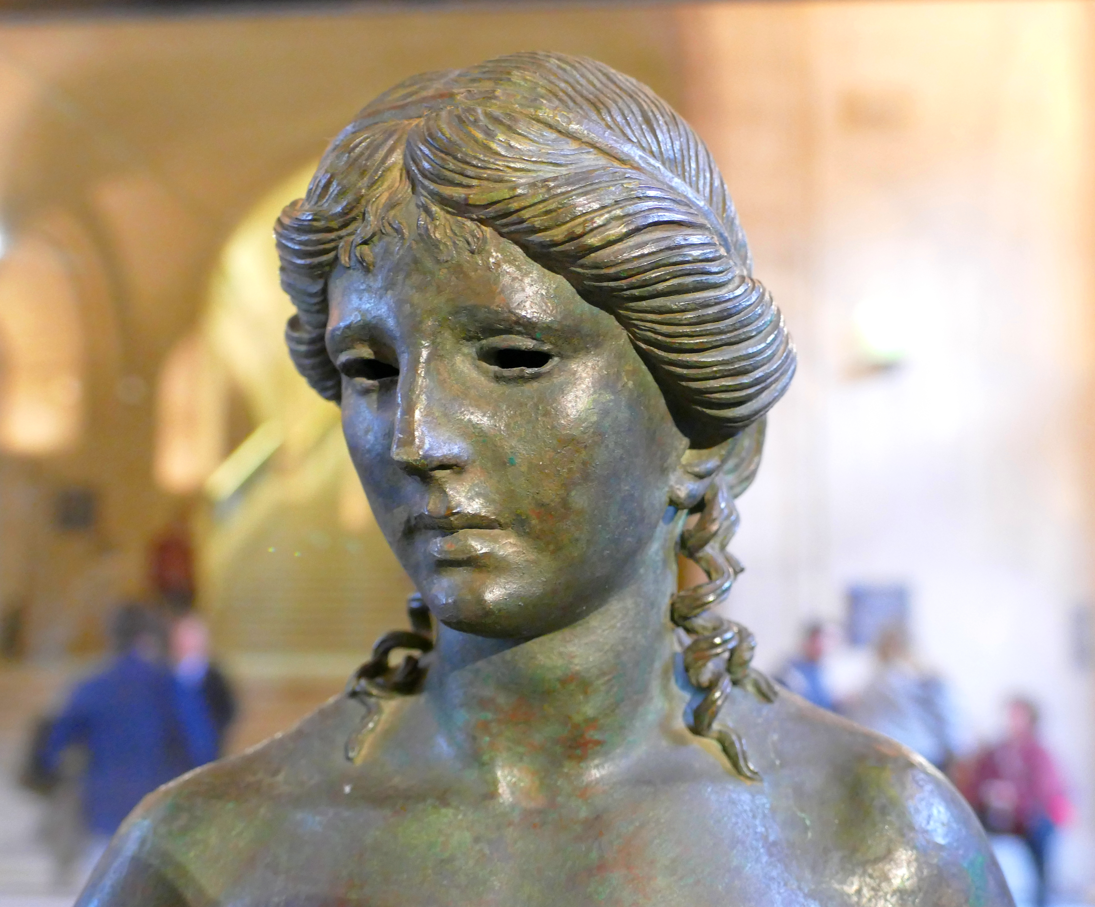 Apollon citharède de Pompéi, détail : la tête. Statue en bronze, 68 cm. IIe ou Ier siècle av.JC. Exposition temporaire au Louvre (Paris) avant acquisition. Origine Grèce ou copie romaine.